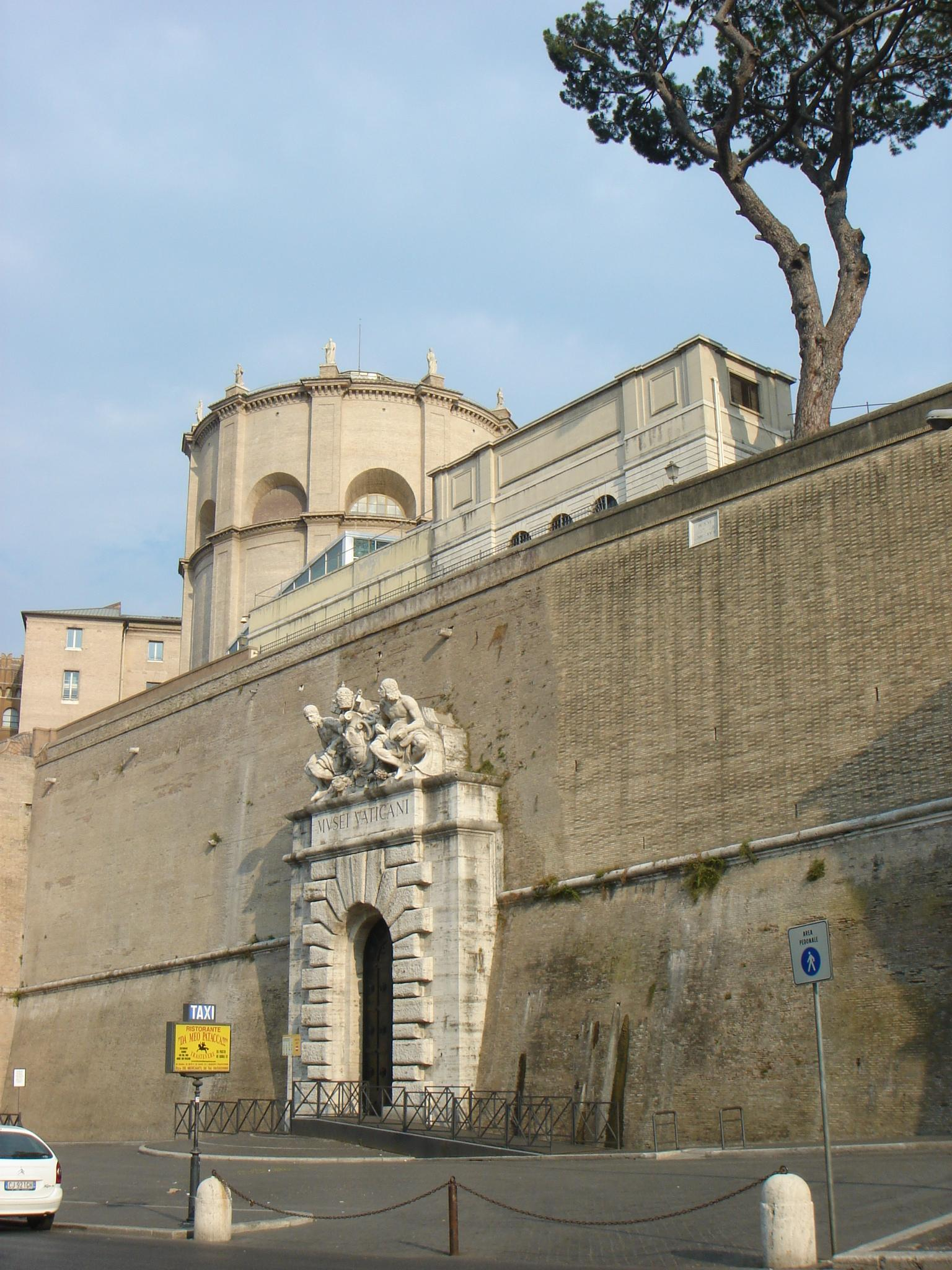 Roma, ingresso ai Musei Vaticani